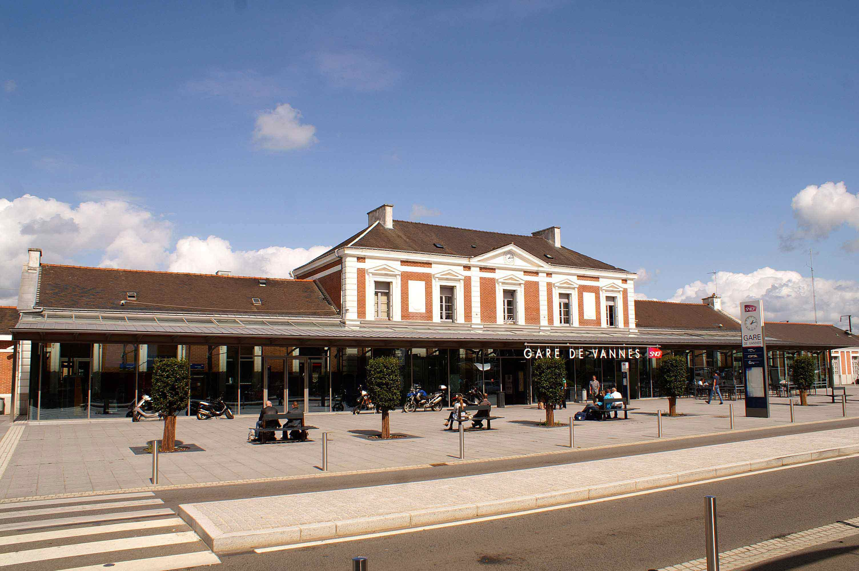 Gare de Vannes, bâtiment voyageurs vue du côté ville